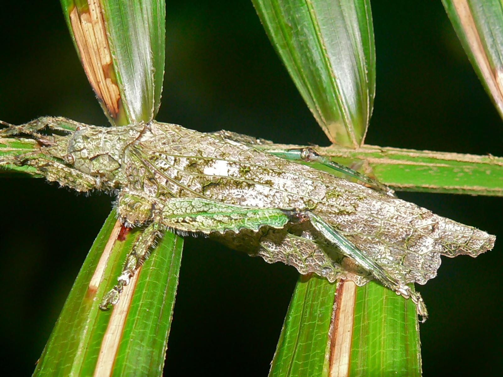 Khao Yai NP THAILAND